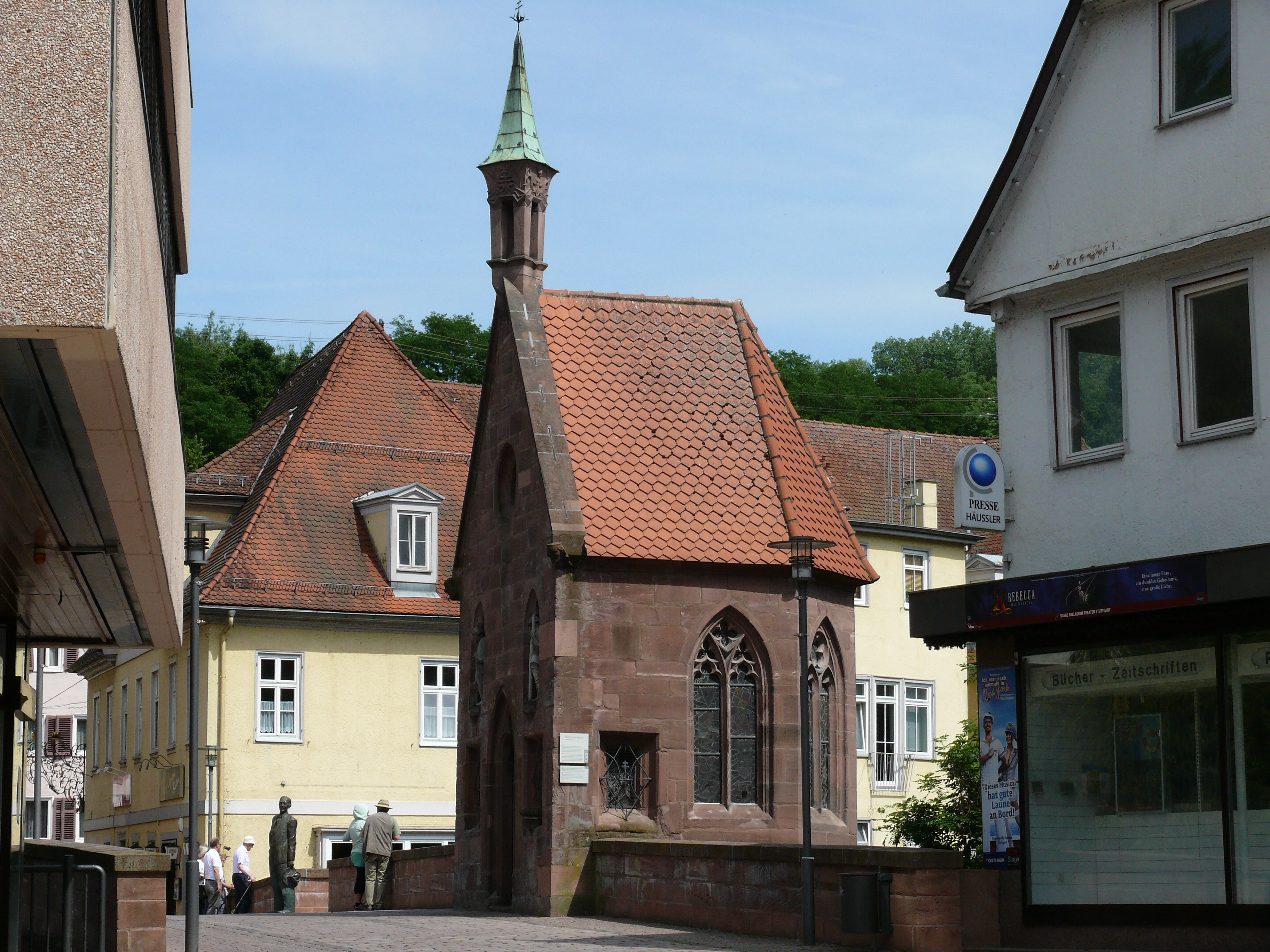 Die Nikolauskapelle auf der Nikolausbrücke in Calw. Blick vom Hermann-Hesse-Platz.